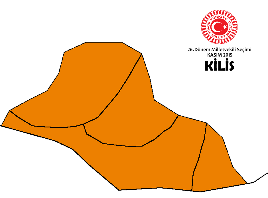 Kasım 2015 seçimleri